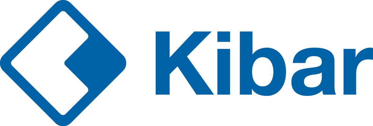 Kibar Holding logosu